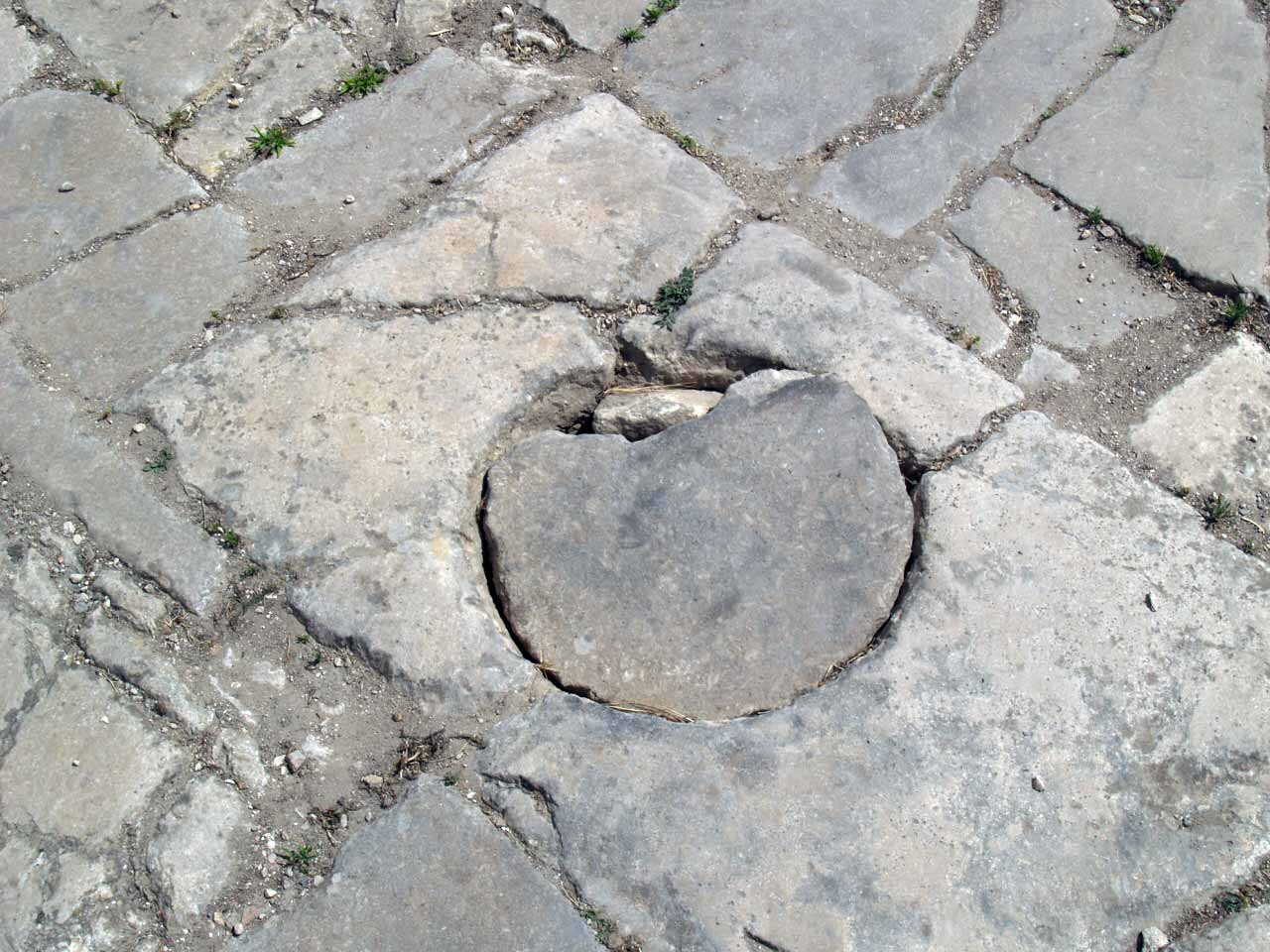 Dougga Plaque d'égout